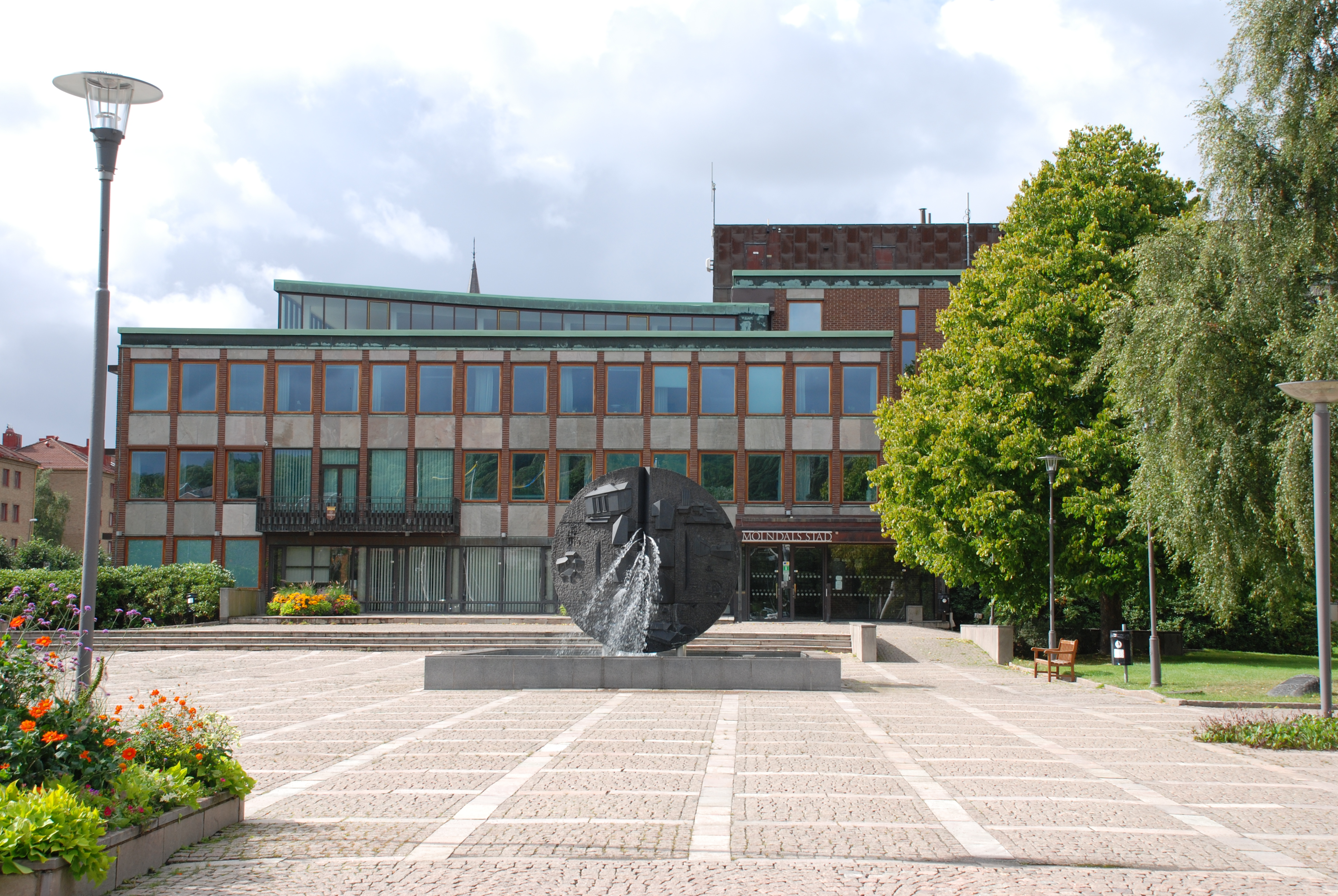 Mölndals stadshus.